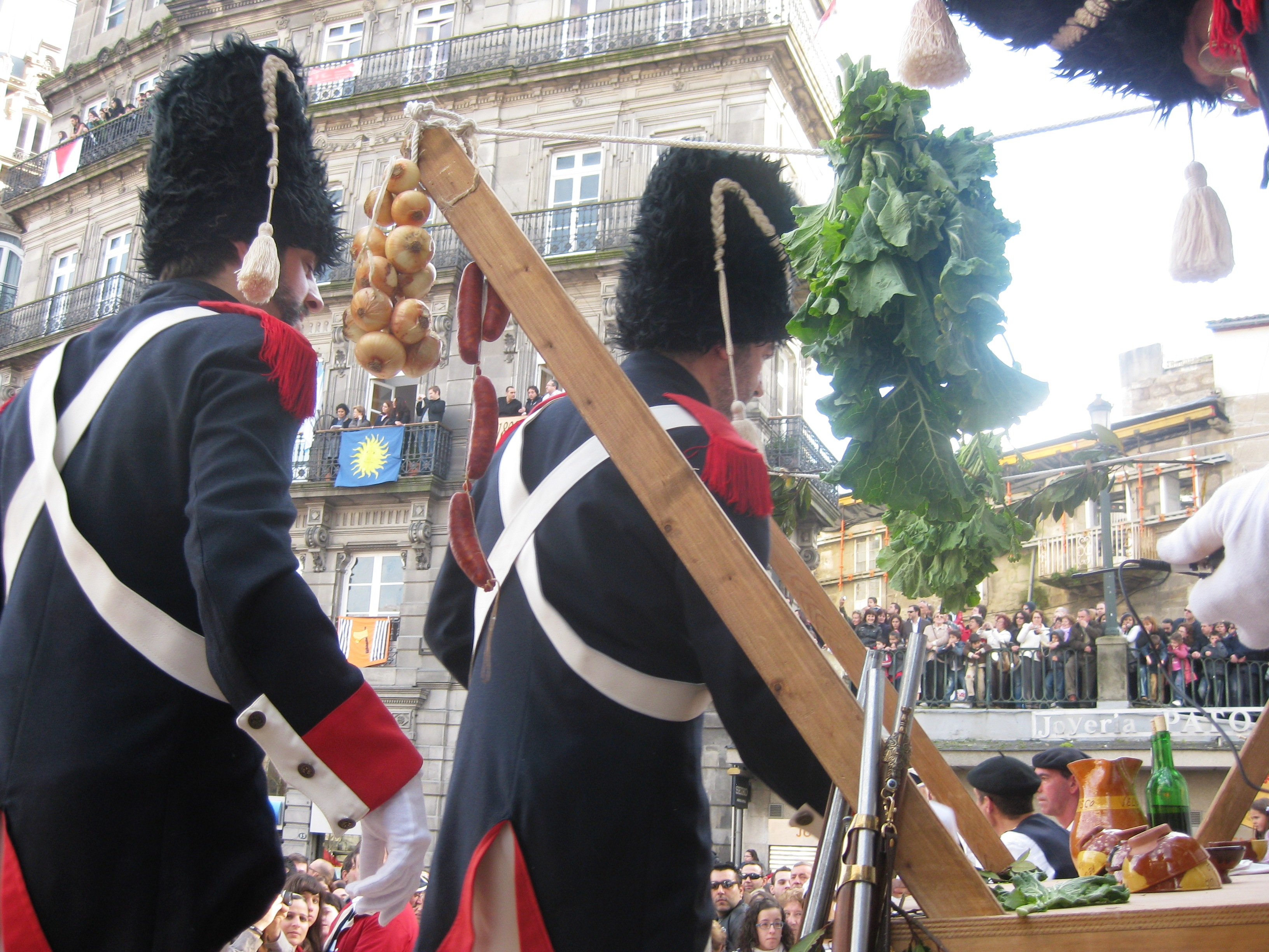 Foto de la representación de 2010 de la Reconquista de Vigo